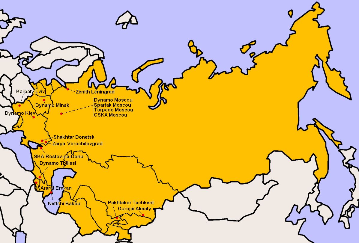 Clubs participants à la Classe A 1971.